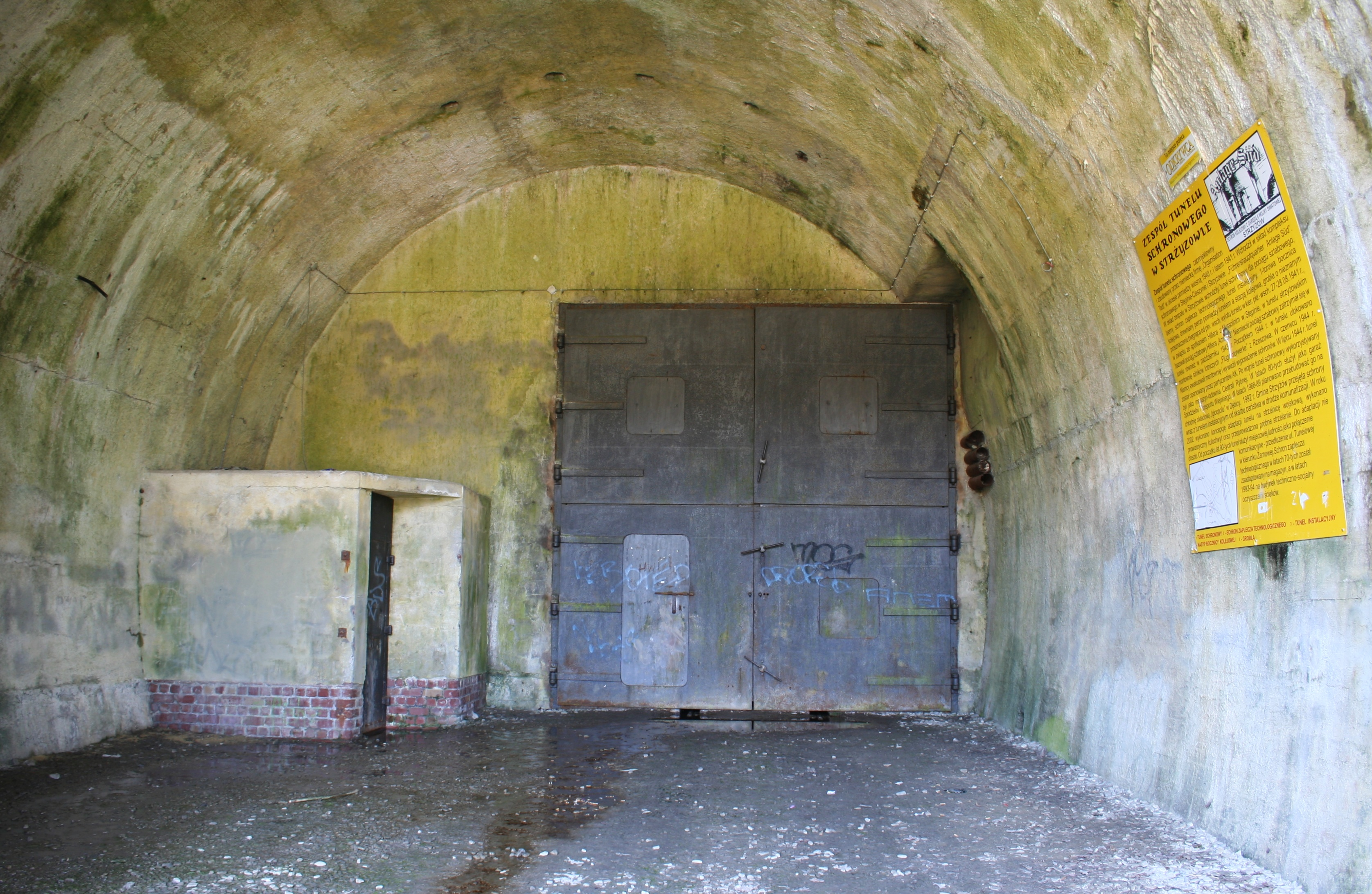 Tunel schronowy dla pociągu sztabowego w Strzyżowie, woj. podkarpackie. Tunel zbudowany został w okresie okupacji niemieckiej.